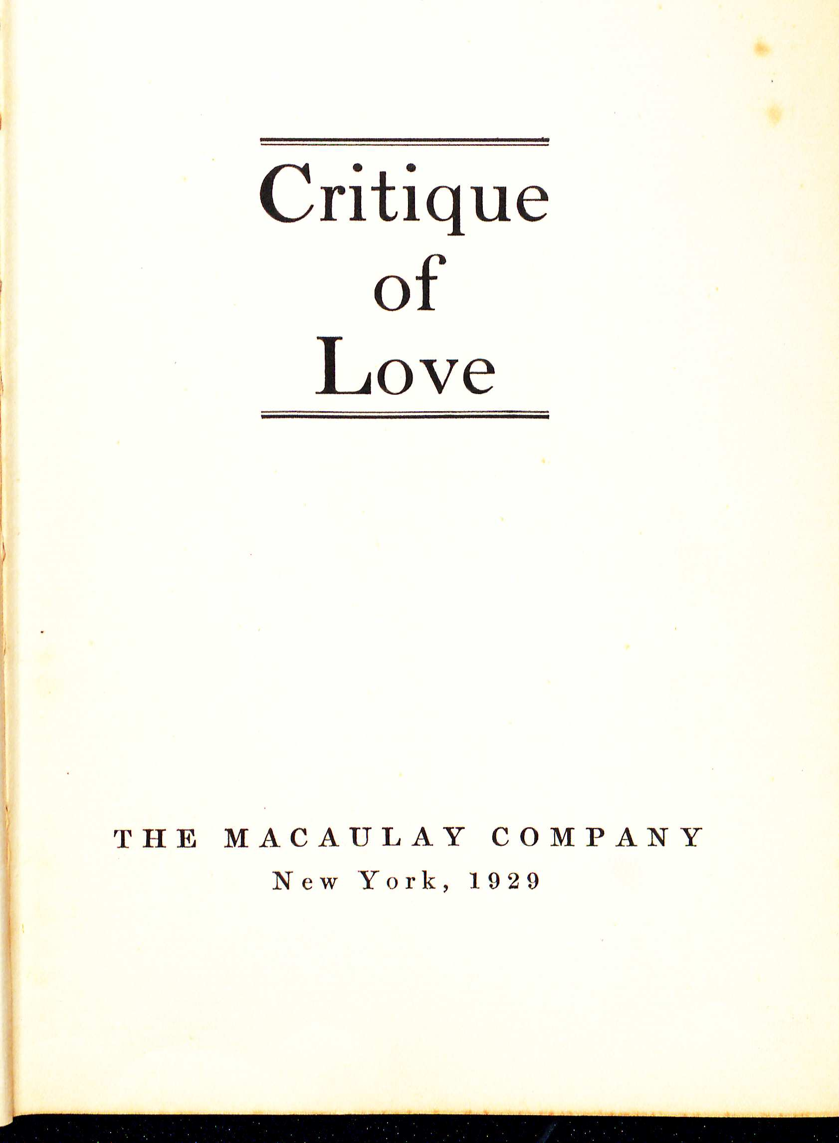 Fritz Wittels Critique of love. New York: The Macaulay Company, 1929. Universitätsbibliothek Duisburg-Essen